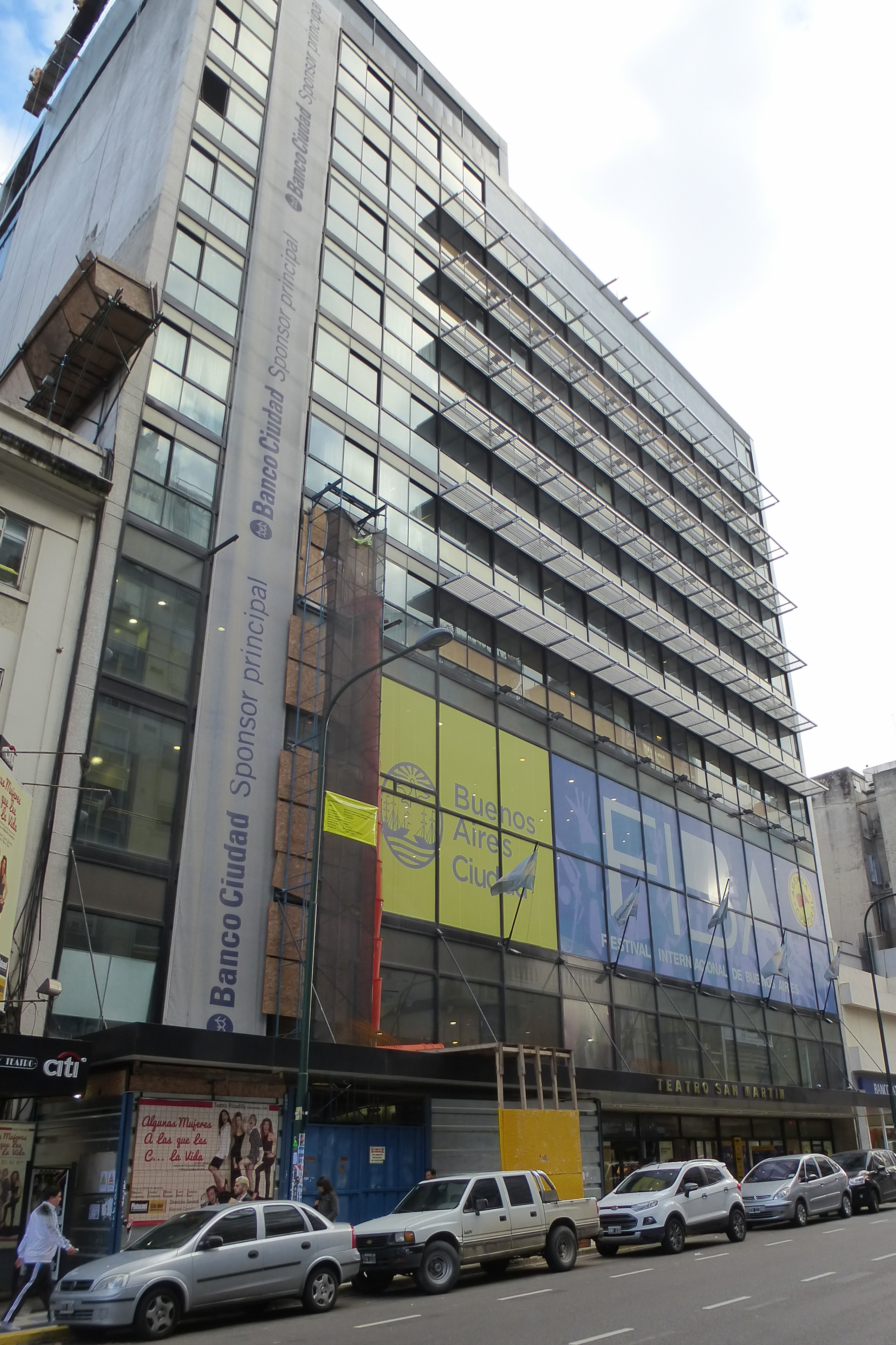 Teatro General San Martín